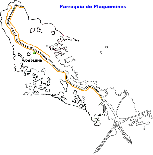 Woodland, Louisiana